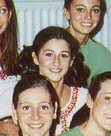 Begoña Blasco con la selección nacional de gimnasia rítmica en 1975.